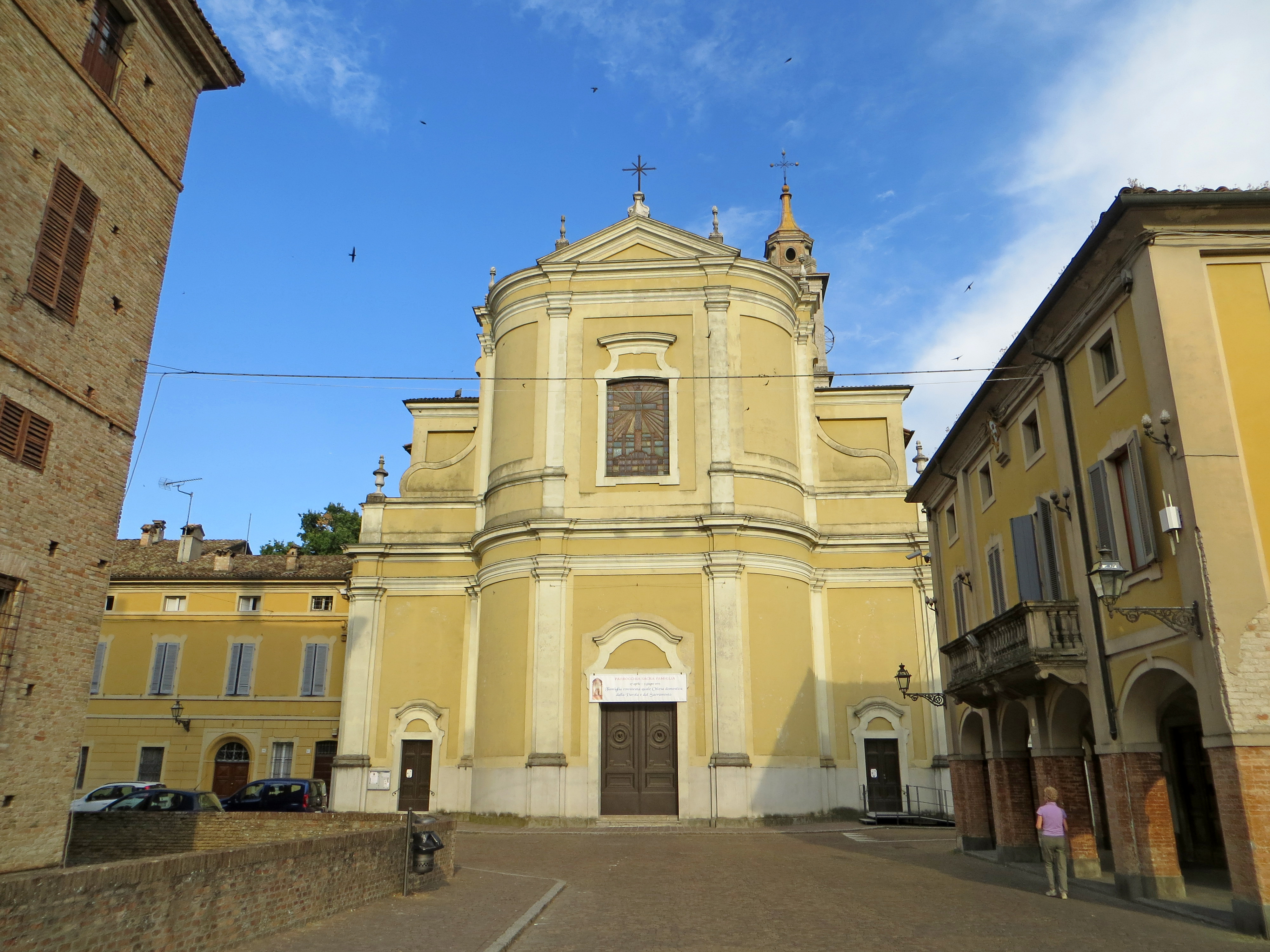 Chiesa di San Giacomo (Soragna) - facciata